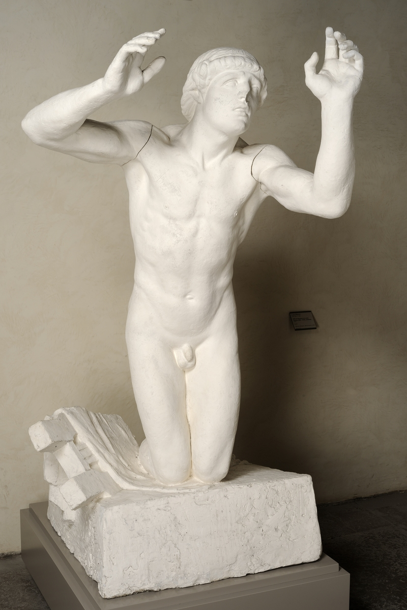 Statuette